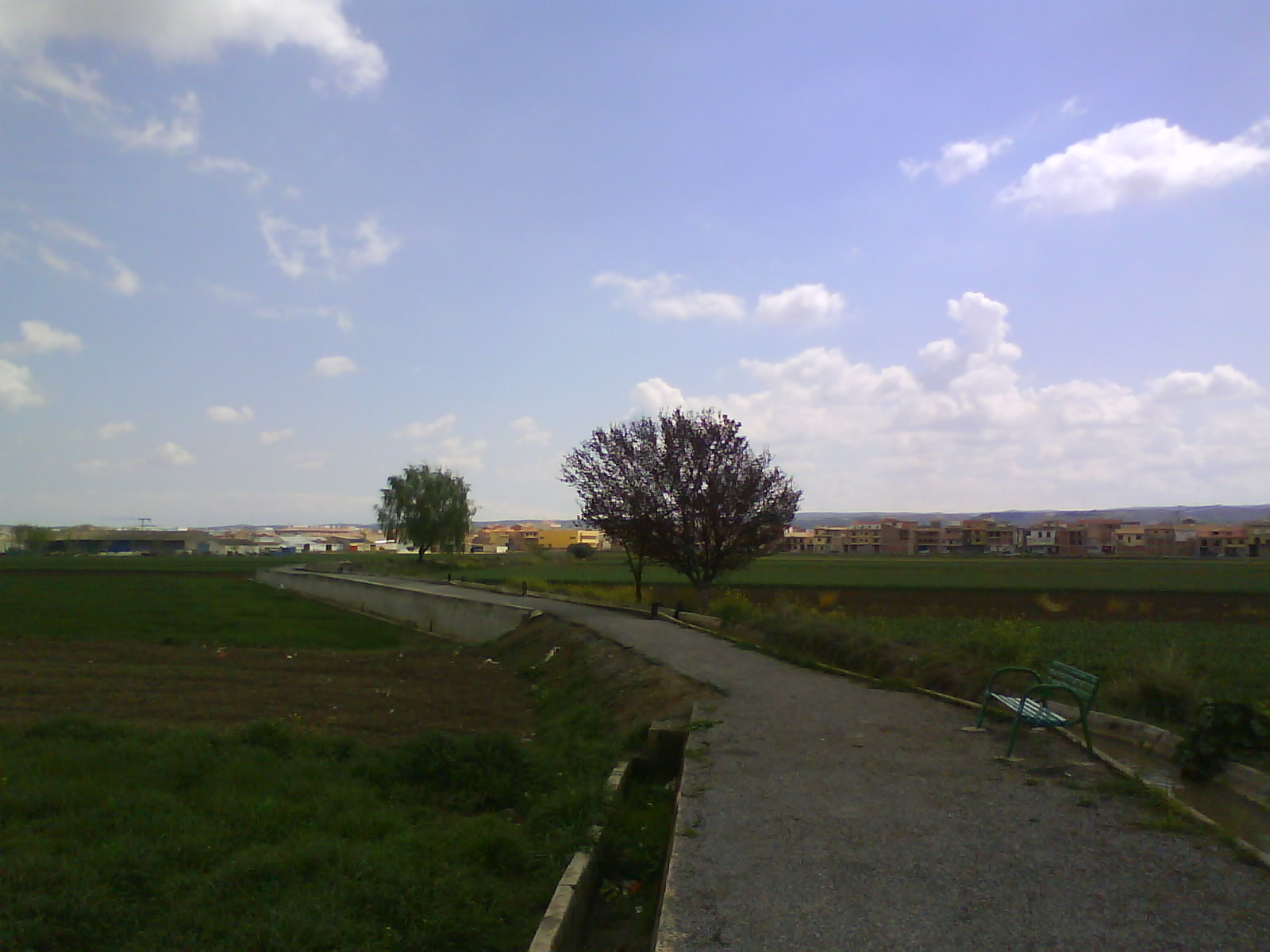 Paseo de la Acequia Gorda, en Huétor Tájar (Granada, España)